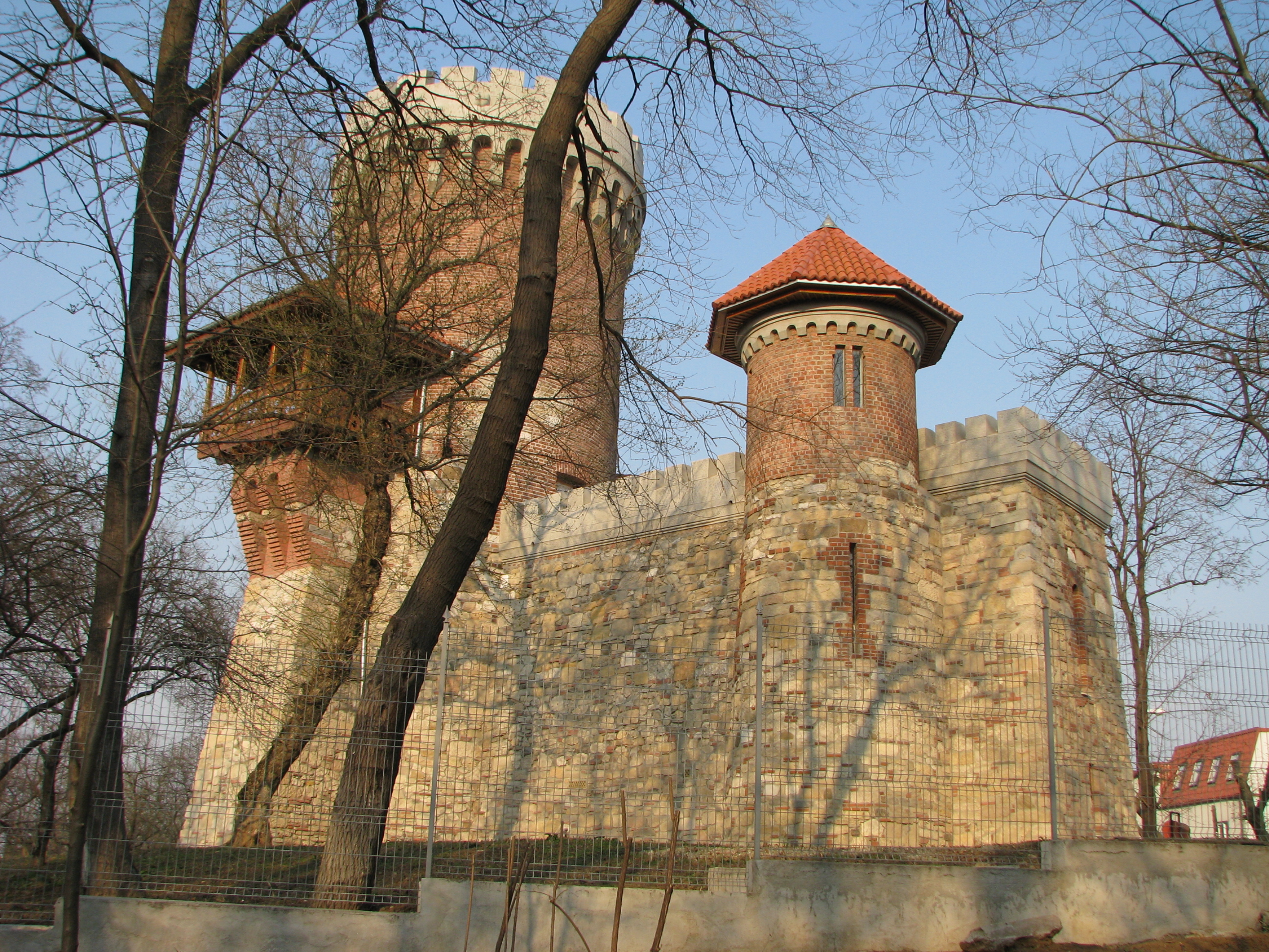 Castelul "Țepeș" din parcul Carol